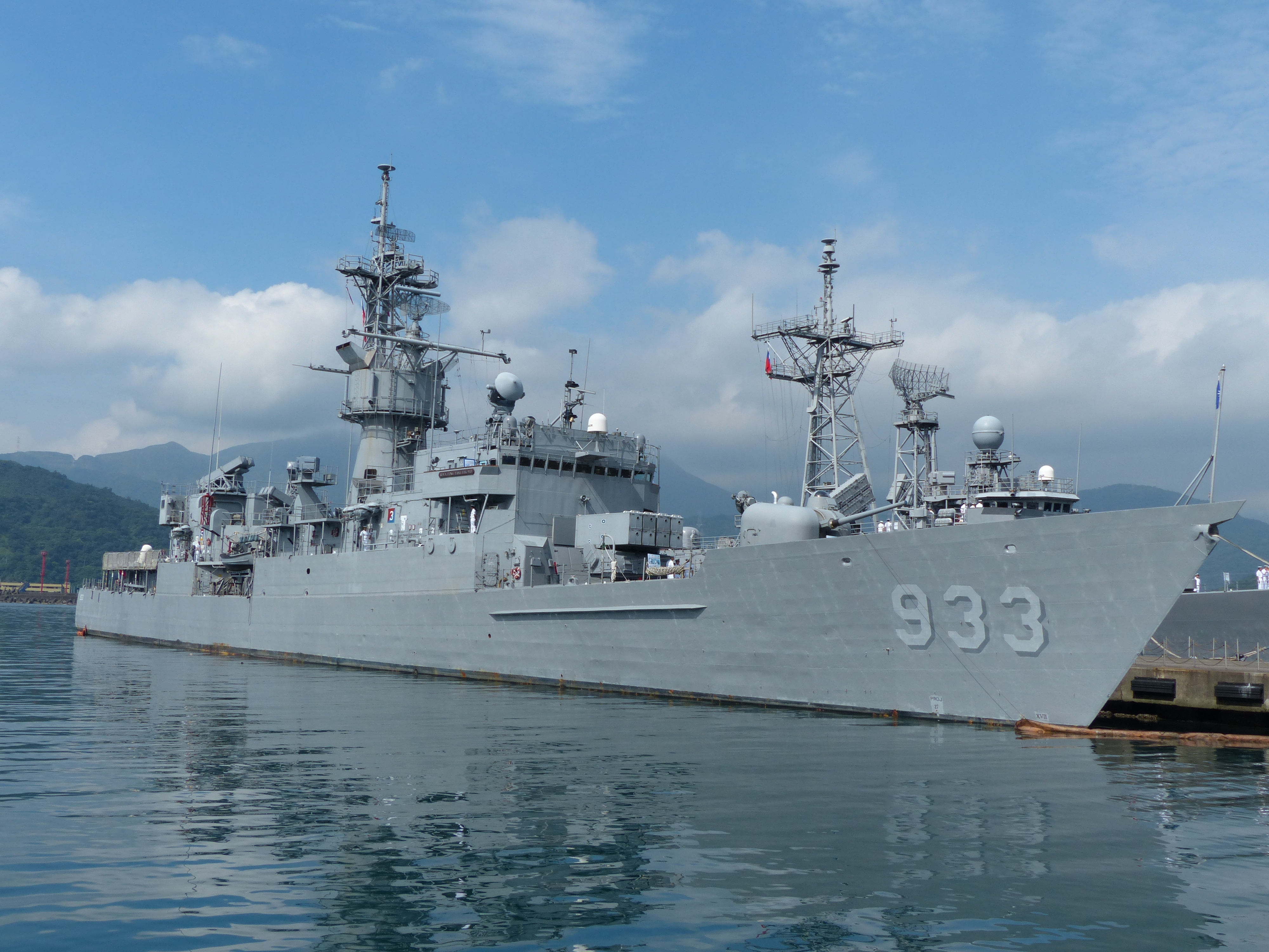 2013年中正軍港營區開放活動開始前，停泊12號碼頭的巡防艦鳳陽（FFG-933）。後方是成功級巡防艦子儀（PFG2-1107），停泊鳳陽對面。